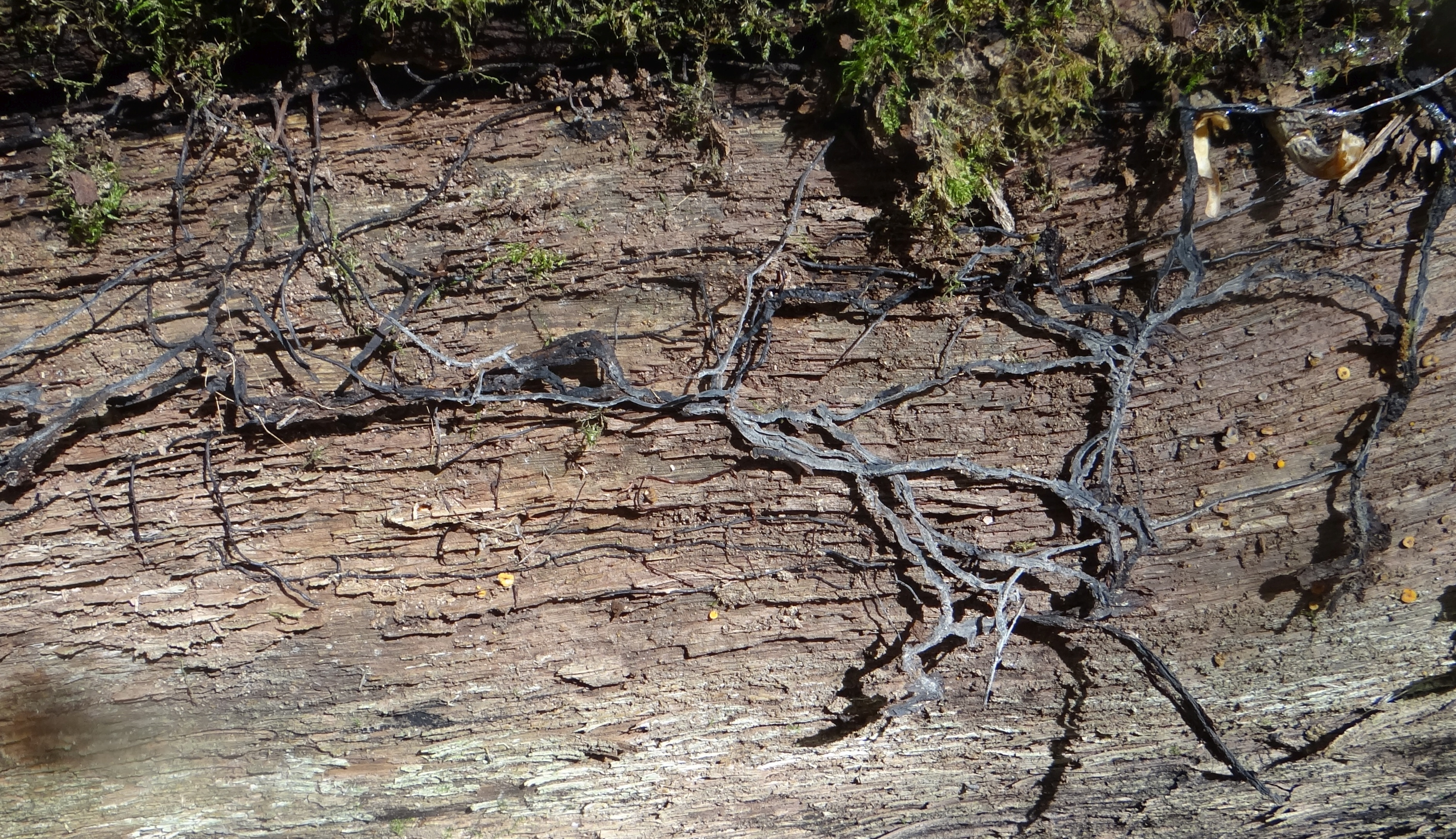 Rhizomorph Armillaria